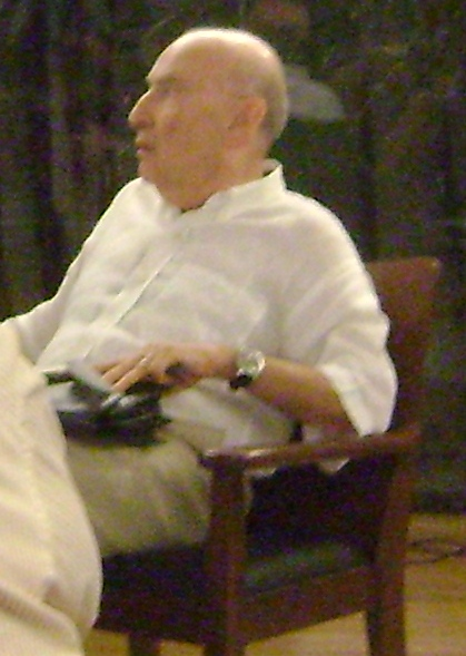 Boris Fausto, historiador e cientista político brasileiro, durante conversa sobre o lançamento de seu livro "Memórias de um historiador de domingo" na Livraria da Vila da Alameda Lorena, em São Paulo.